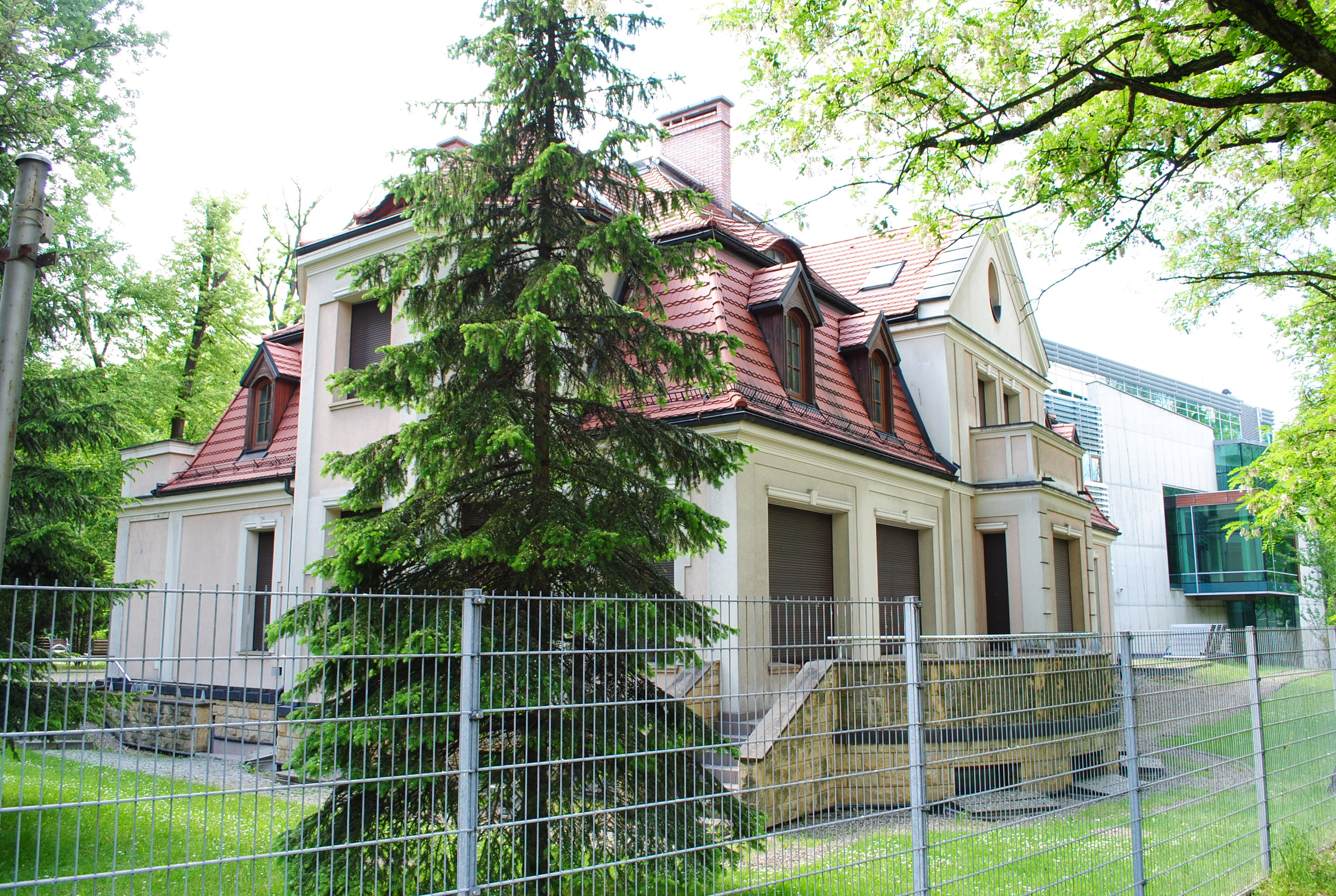 Katowice - Giszowiec. Ulica Pszczyńska. Willa Uthemanna